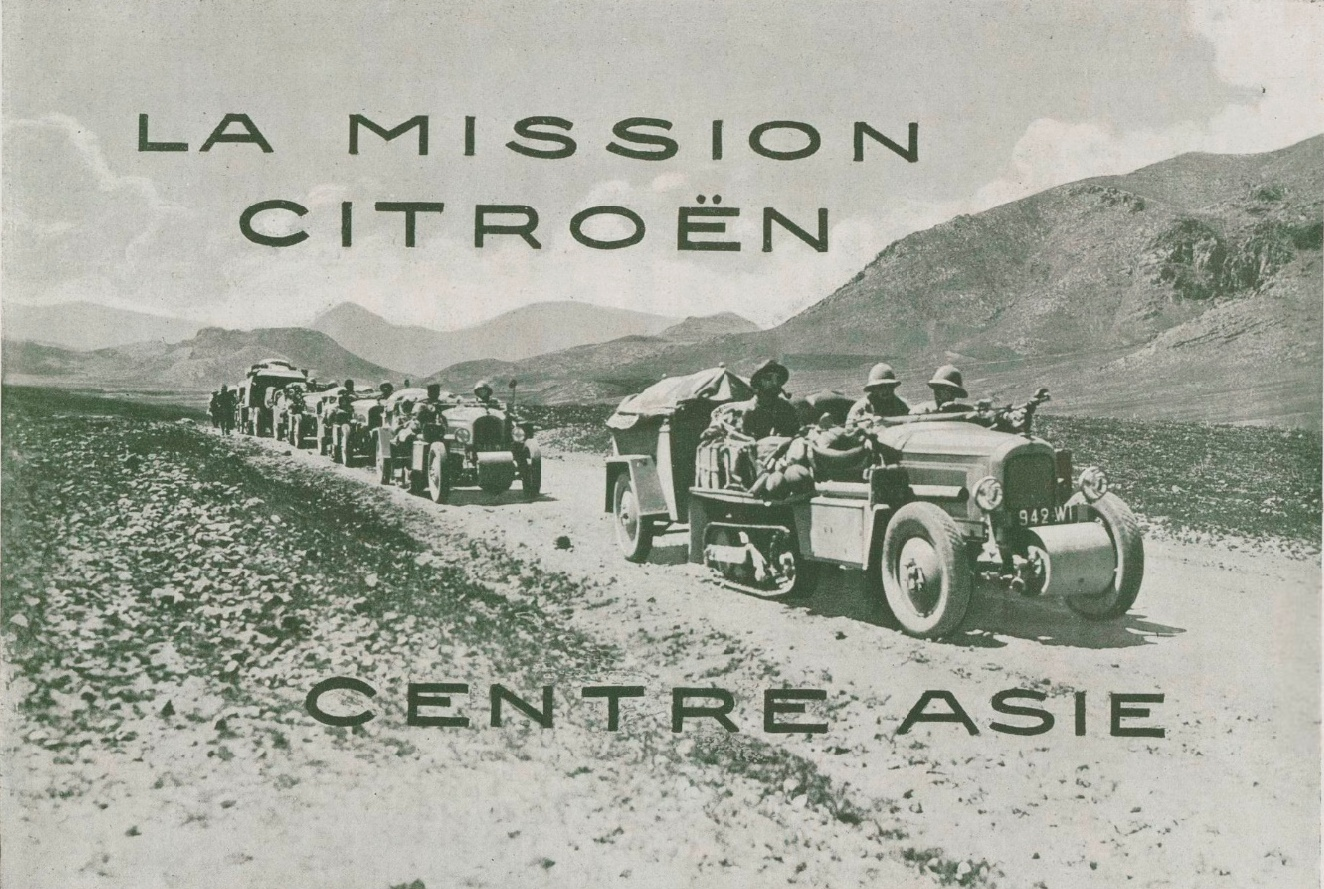 Les autochenilles du groupe Pamir sur une route d'Asie centrale. Photographie publiée en décembre 1931 dans la revue mensuelle Le Monde colonial illustré, pour illustrer un article mettant en valeur l'expédition Centre-Asie Citroën de 1931 - 1932 (Croisière Jaune).